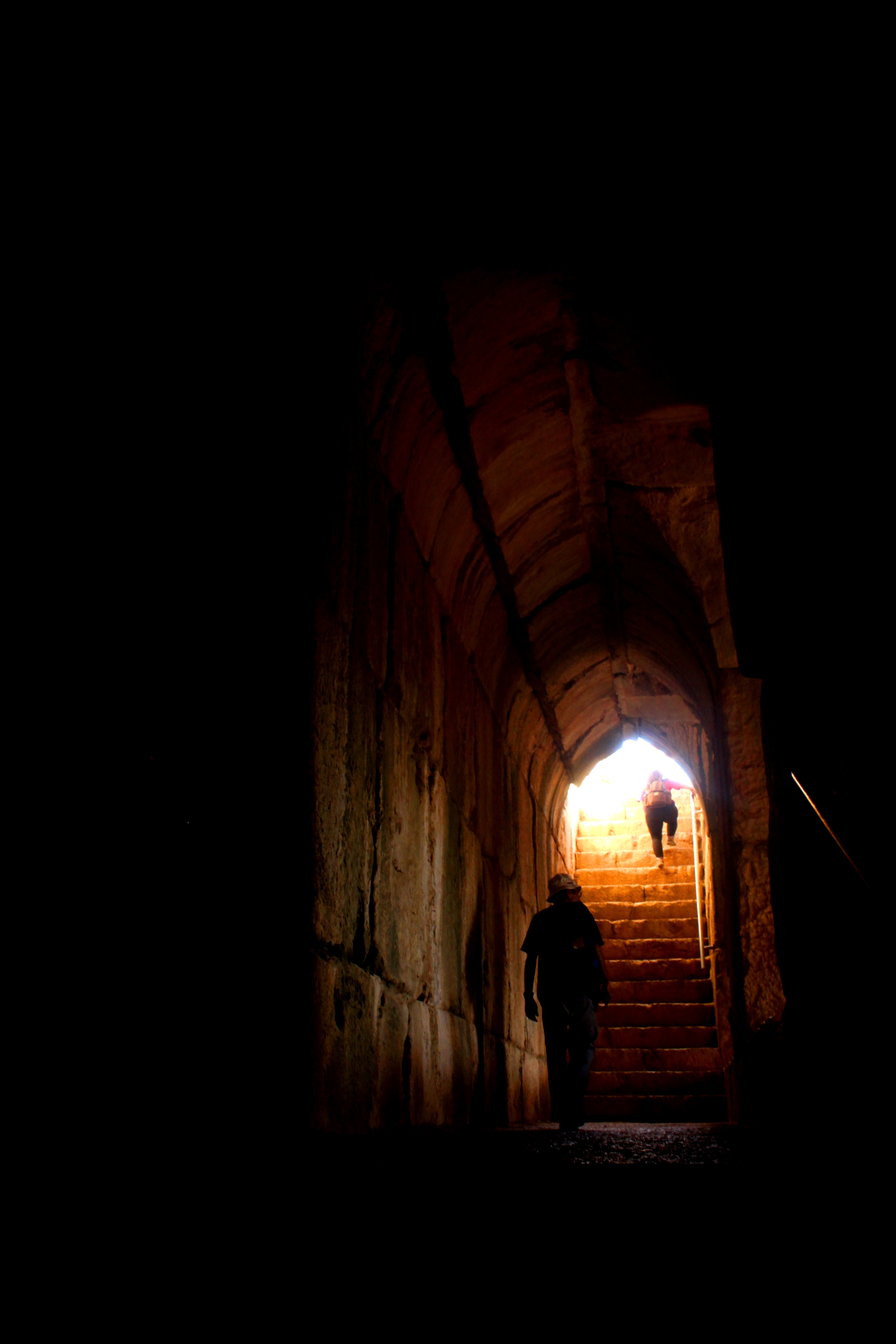 מבצר נמרוד (ידוע גם בשמות קַלְעַת נַמרוּד וקַלְעַת אֶ-צוּבֵּייבָּה - בערבית: قلعة الصبيبة) הוא אתר ארכאולוגי מתקופת ימי הביניים, ובו שרידי מבצר גדול אשר נבנה ובוצר במרוצת השנים על ידי צבאות איובים וממלוכים. המבצר שוכן בשיאו של רכס צר בגובה של כ-800 מטר מעל פני הים, למרגלות הר החרמון, כ-3 קילומטר מדרום-מערב ליישוב נווה אטי"ב, וכ-1,300 מטרים צפונית-מזרחית ליובלו של נחל סער. המקום מוכרז כגן לאומי.